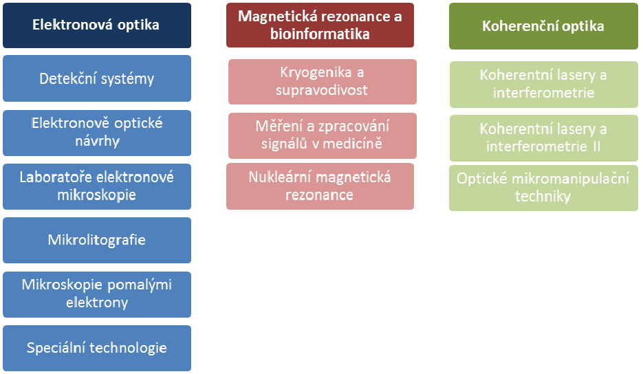 Organizační struktura ÚPT AV ČR 2011